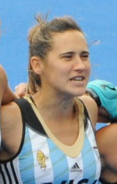 GB v Argentina 2016 CT